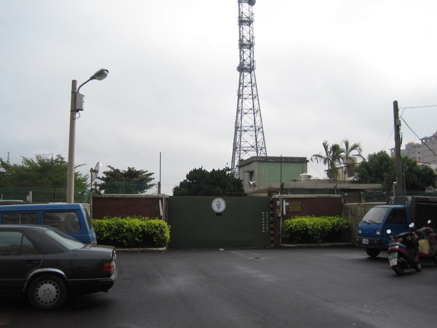 在台南市東區和平里的台電變電所